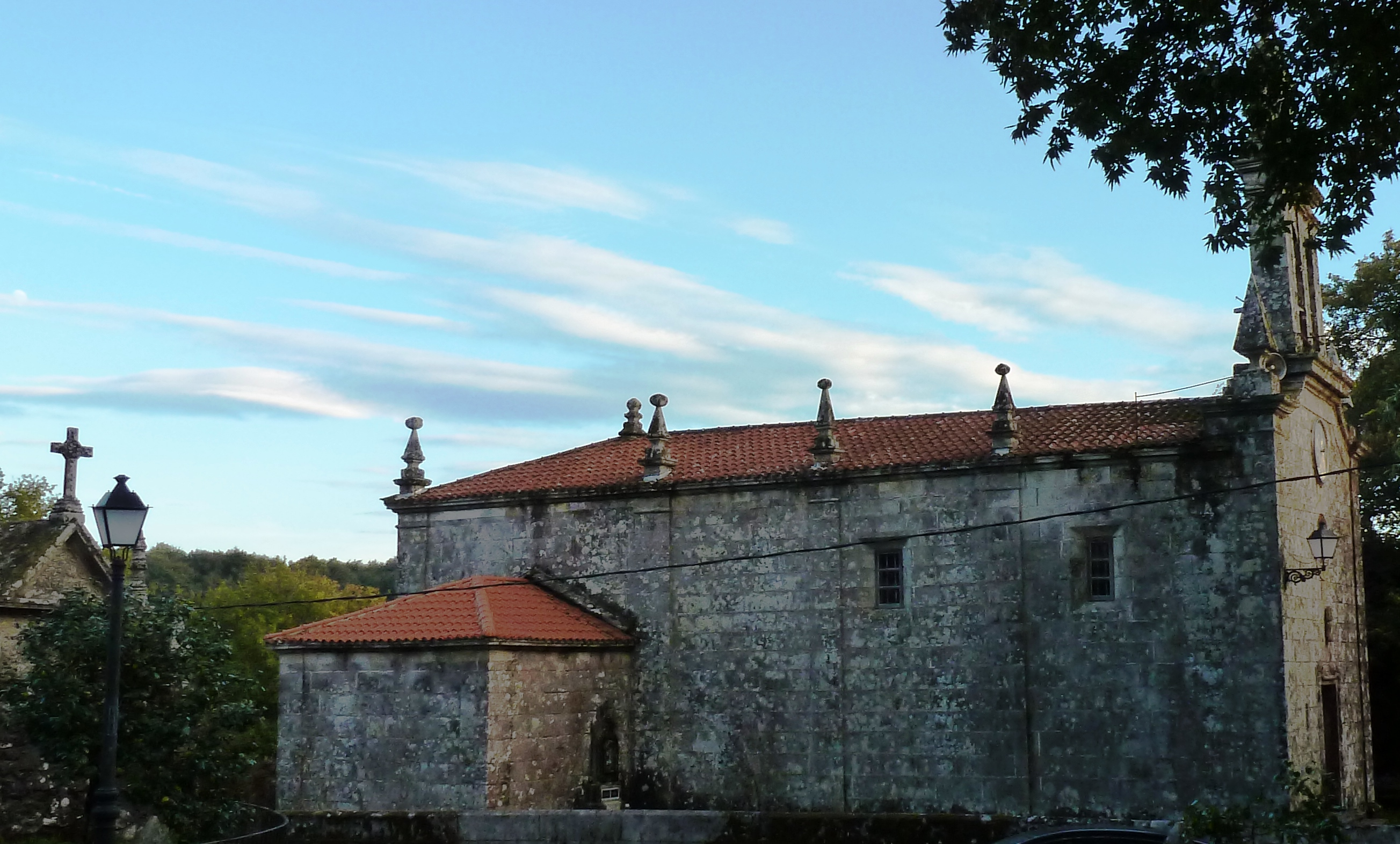 Igrexa de Buciños, Carballedo